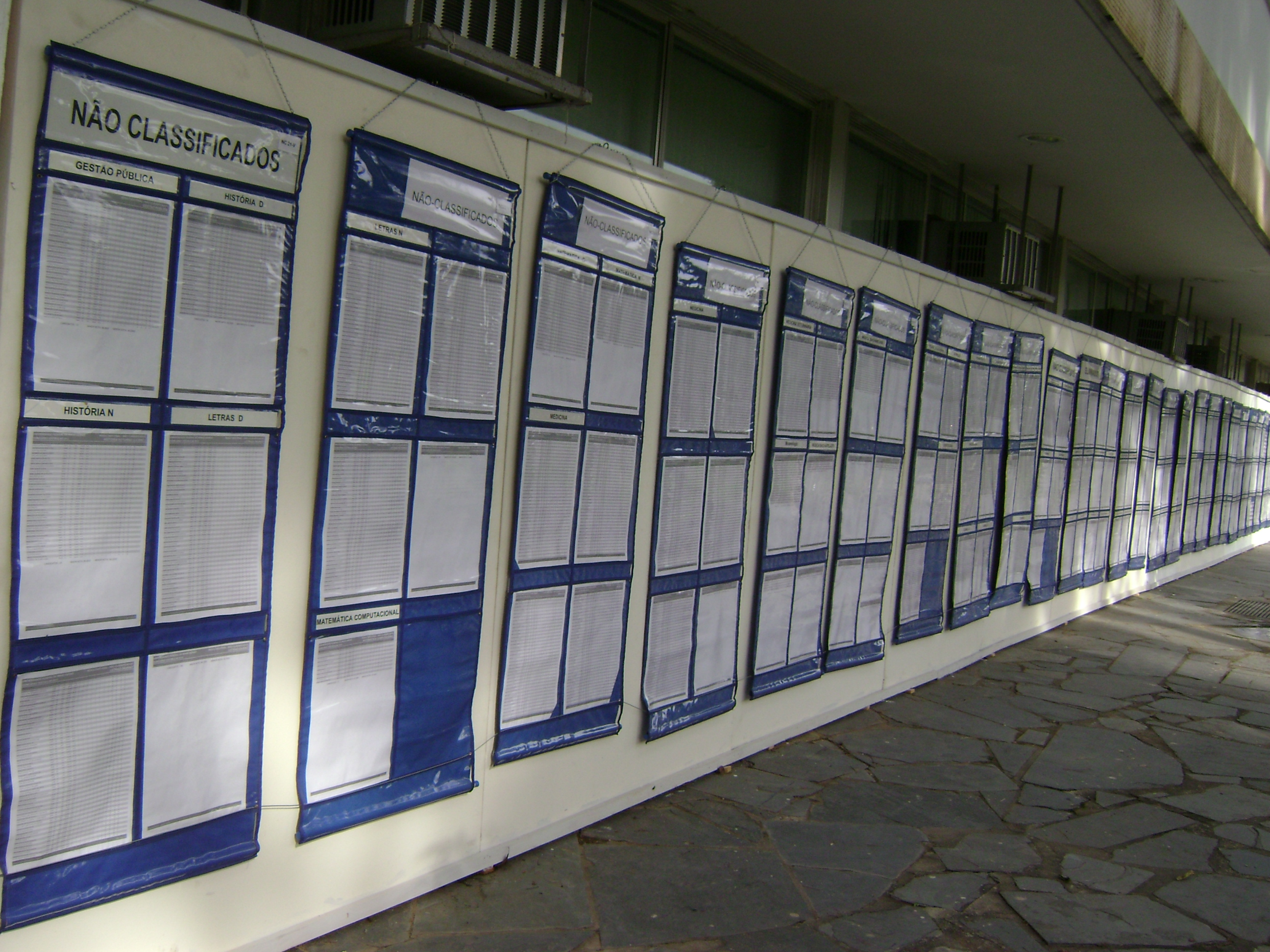 Lista de candidatos na parede da Reitoria da UFMG que passaram ou foram reprovados para o vestibular 2010 da mesma Universidade, em Belo Horizonte, Brasil.